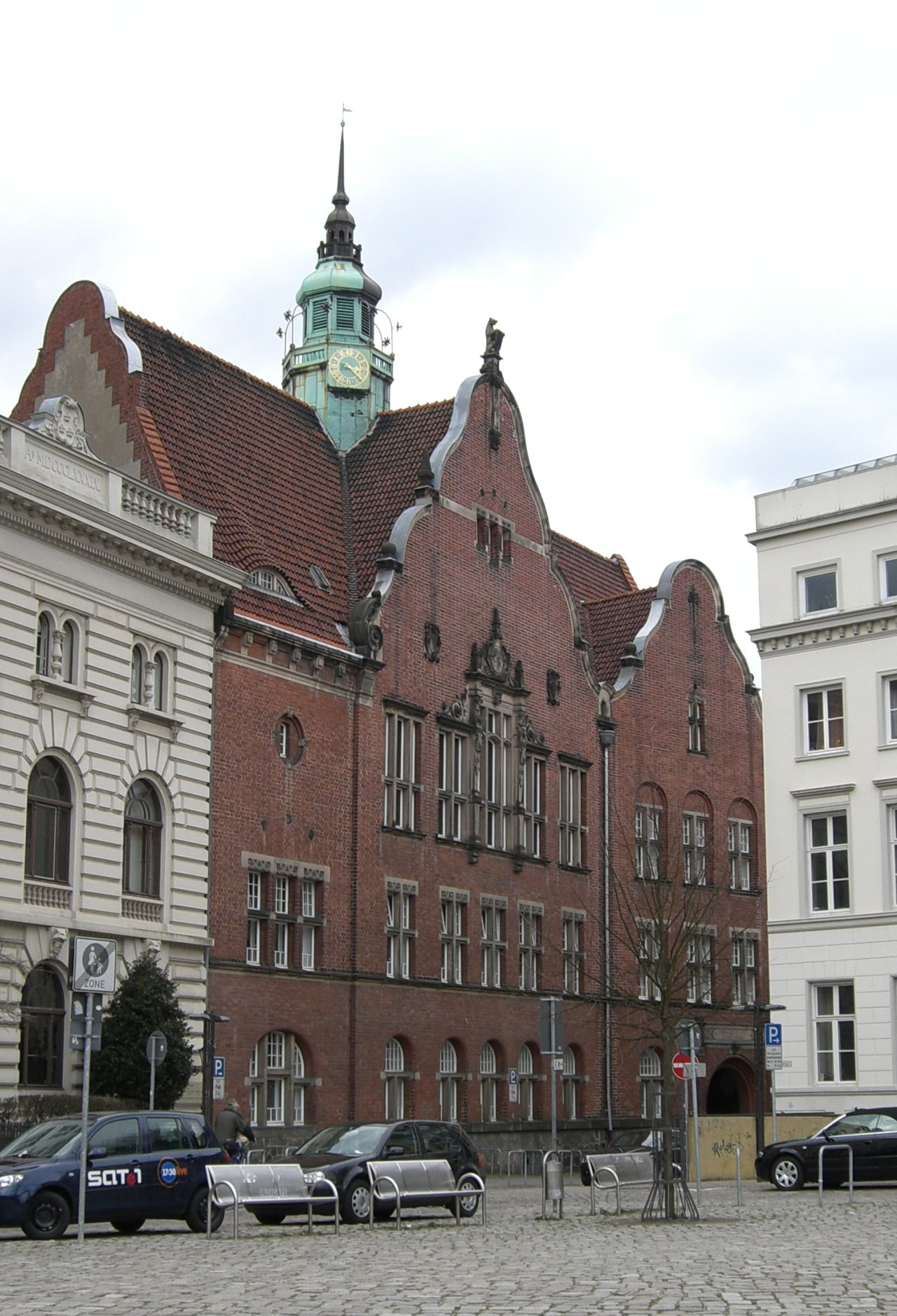 Ernestinenschule Lübeck selbst fotografiert Neue Version ist kleiner